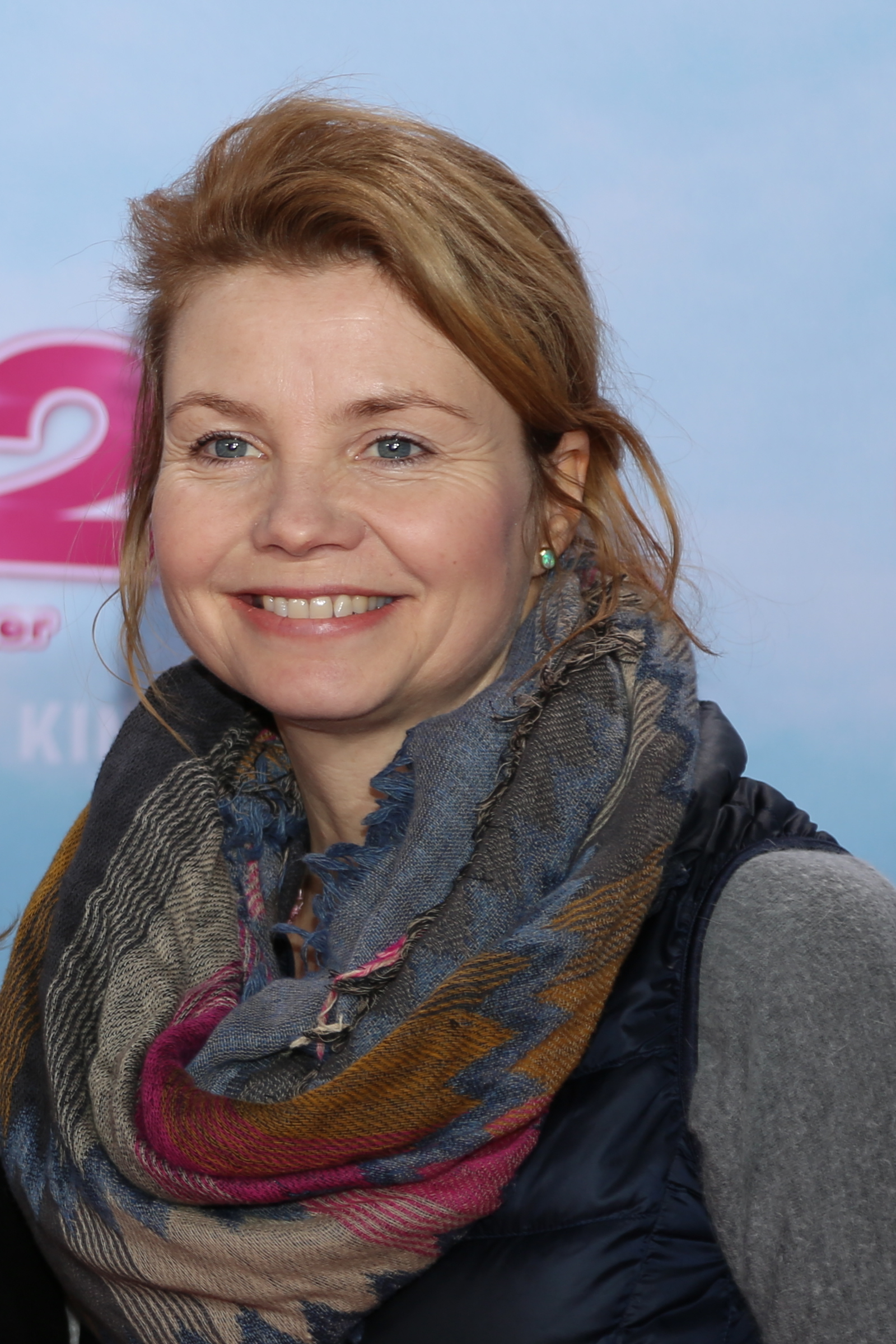 Annette Frier bei der Premiere von Wendy 2, im Februar 2018.